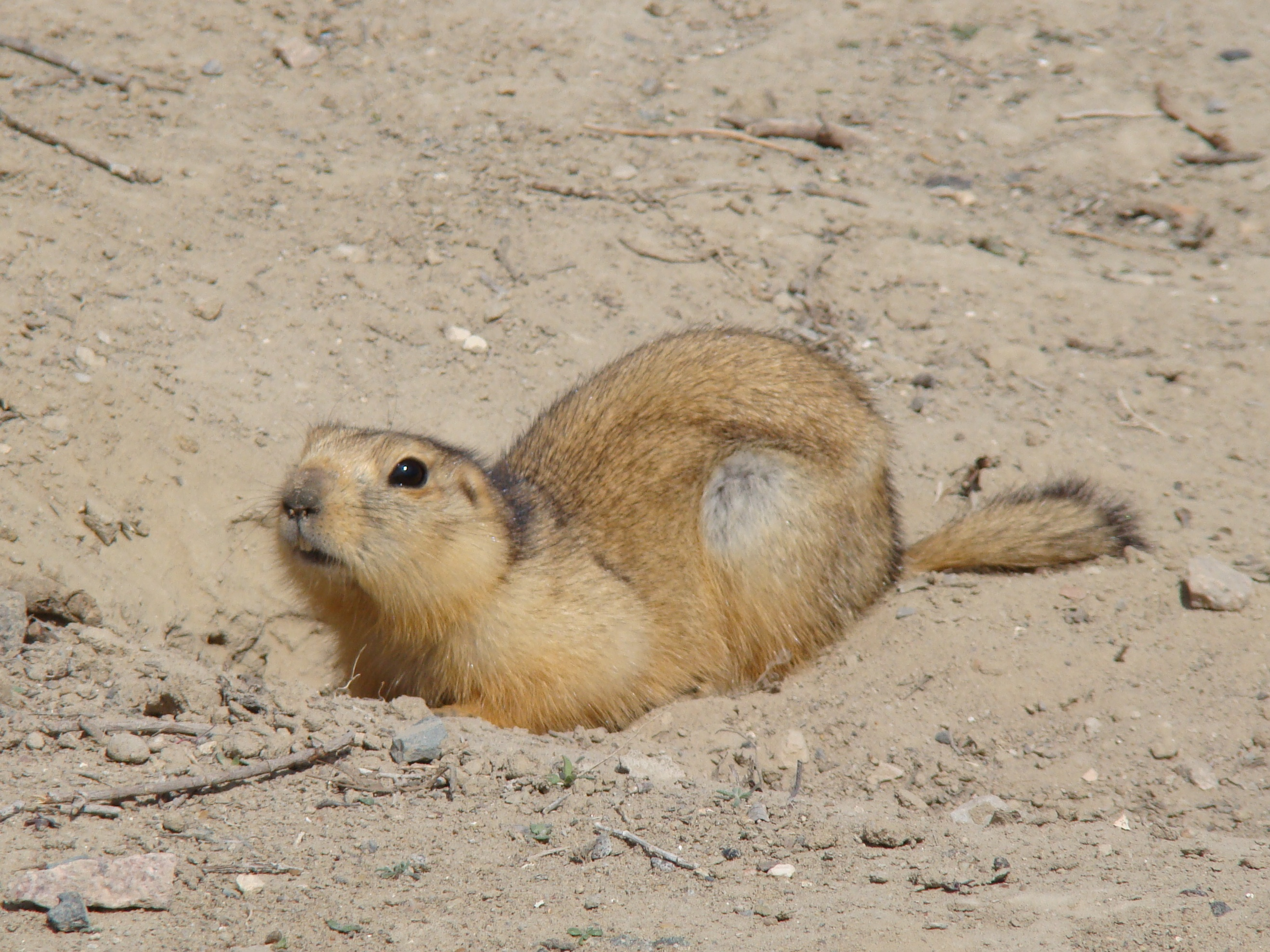 Суслик жёлтый (Spermophilus fulvus). Город Байконур, Кызылординская область, Казахстан